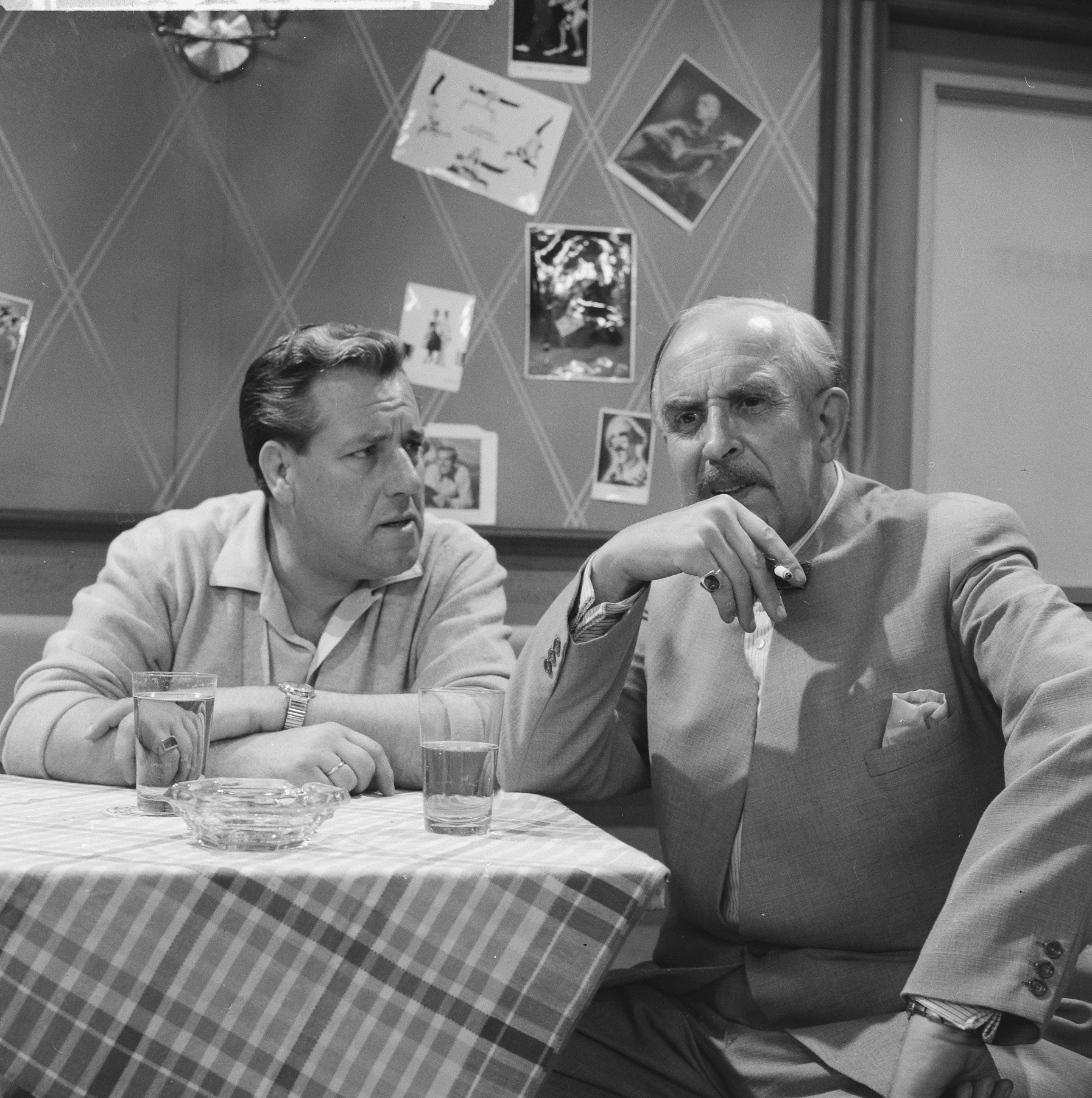 Collectie / Archief : Fotocollectie Anefo Reportage / Serie : [ onbekend ] Beschrijving : TV-spel De komiek enkele fragmenten Datum : 25 april 1962 Trefwoorden : Fragmenten Fotograaf : Koch, Eric / Anefo Auteursrechthebbende : Nationaal Archief Materiaalsoort : Negatief (zwart/wit) Nummer archiefinventaris : bekijk toegang 2.24.01.03 Bestanddeelnummer : 913-8090 Reacties Geplaatst door Televisiespel liefhebber op 27 augustus 2017 - 16:24. AVRO Televisie. TV-spel "De Komiek" van Dimitri Frenkel Frank. Uitgezonden op 26 april 1962 Acteurs Ko van Dijk (l) en Hans Tiemeyer (r)